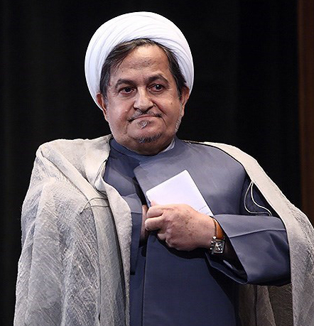 محمدعلی زم - مراسم اختتامیه دومین جشنواره رمز موفقیت - ۲۷ شهريور ۱۳۹۵